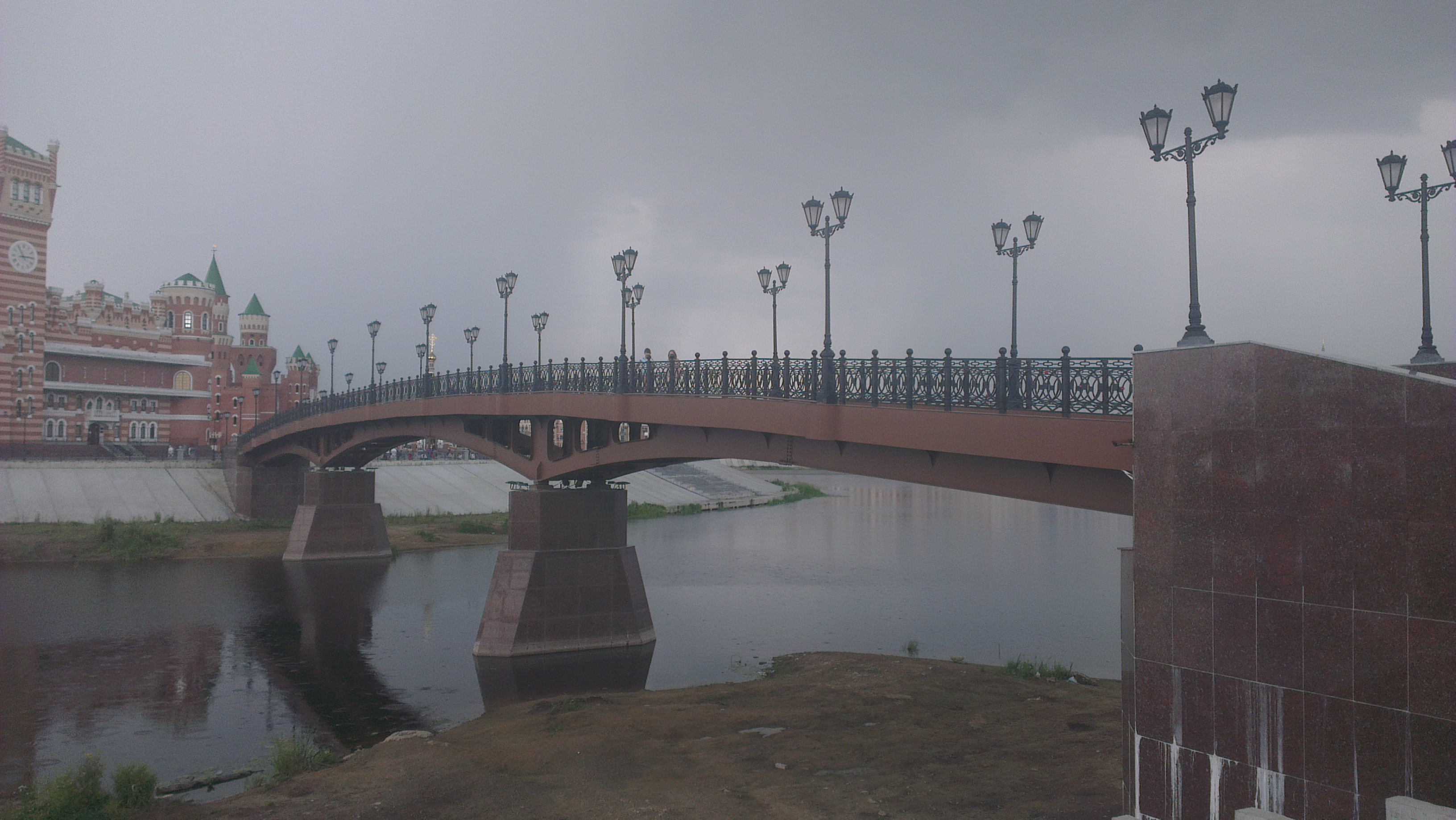 Yoshkar-Ola, Mari El Republic, Russia